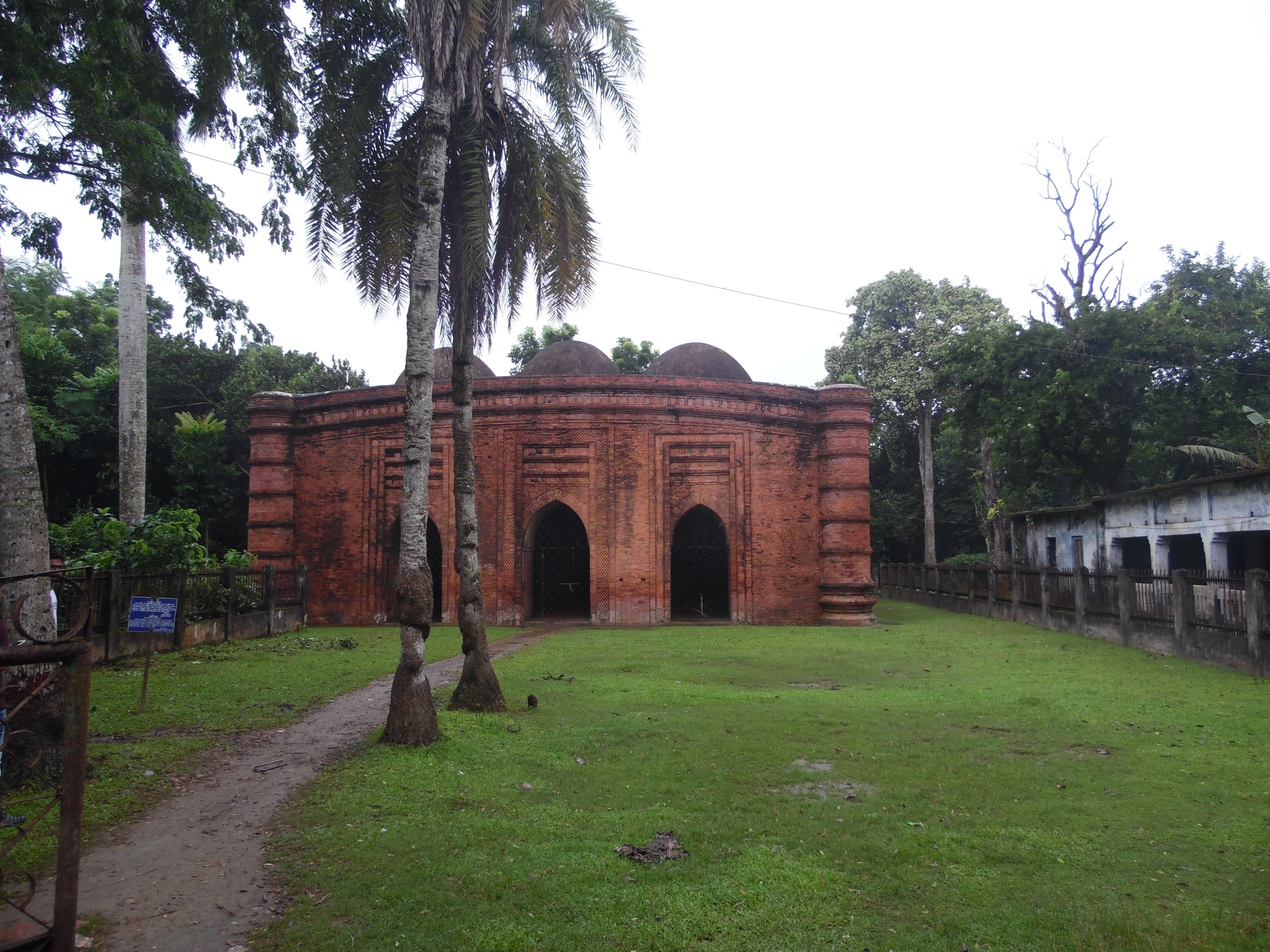 নয়গম্বুজ মসজিদ